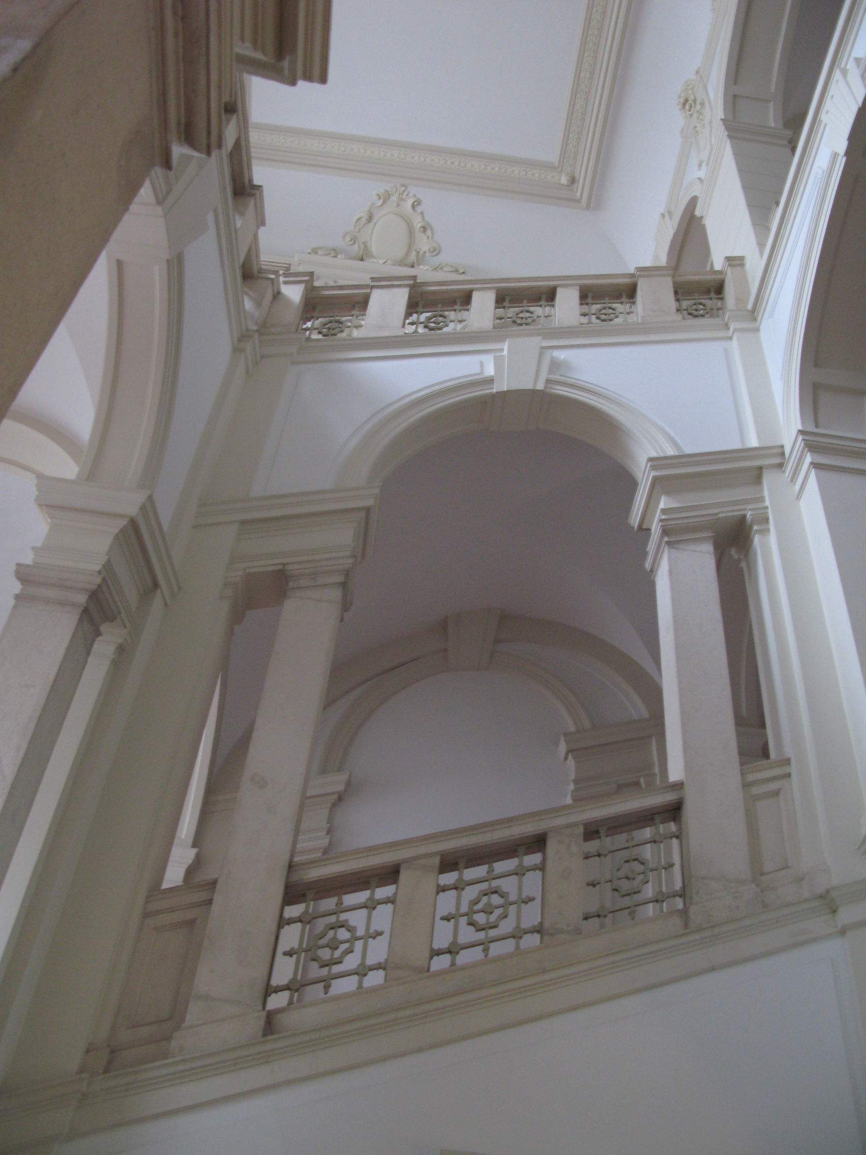 Stopnišče v stavbi Univerze v Ljubljani